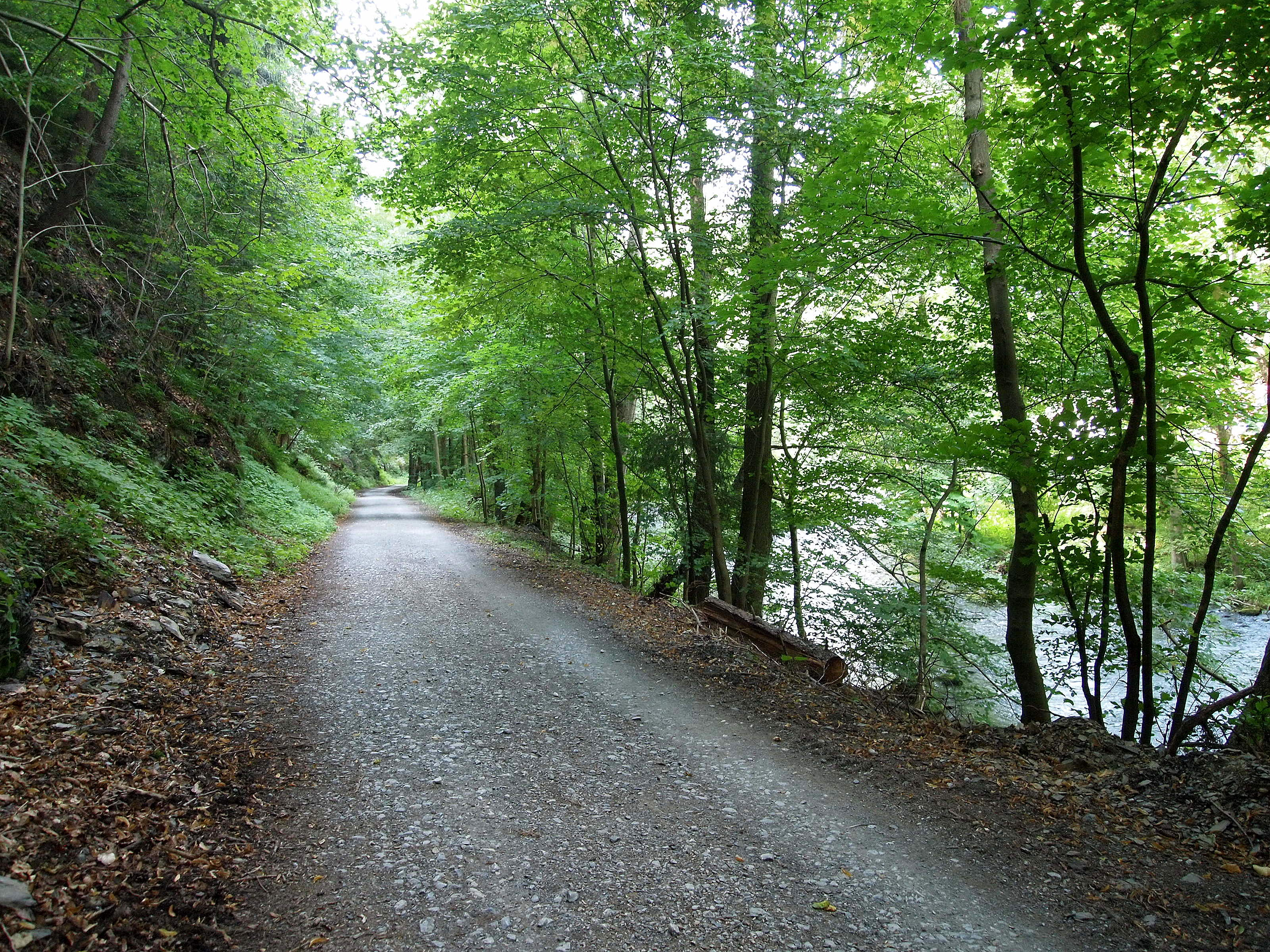 Blick auf Bode und -weg in Altenbrak (Landkreis Harz; Sachsen-Anhalt)